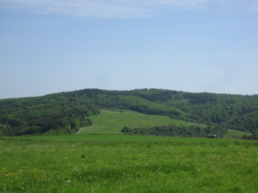 Neunzehntberg im westlichen Hintertaunus